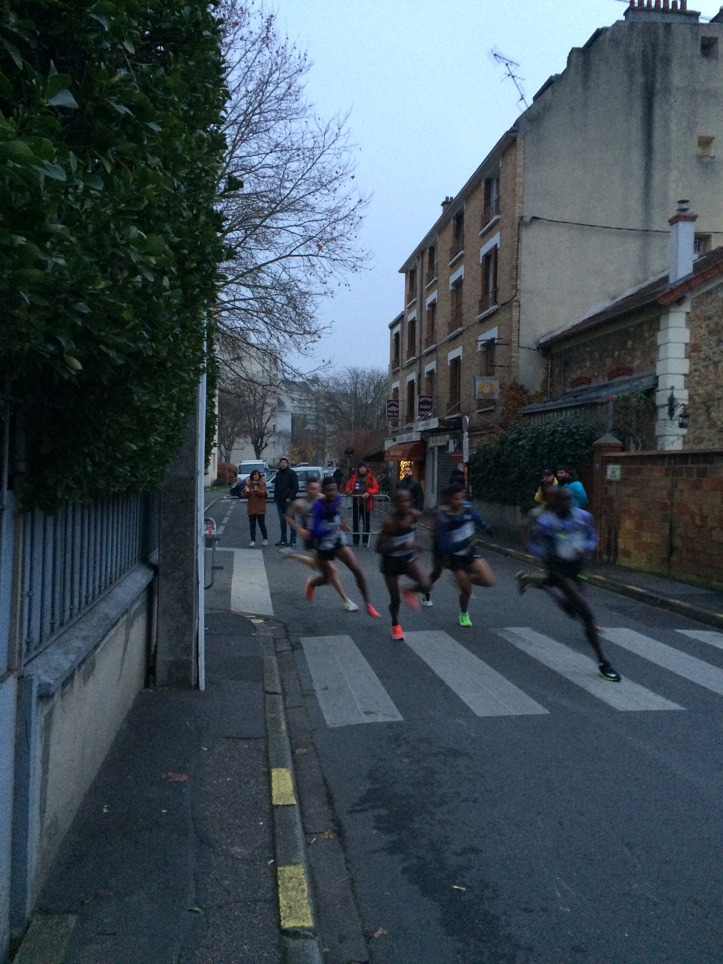 La course des as dans les rues de Houilles, le peloton de tête 2016 dominé par les coureurs de l'Afrique de l'Est (Kenya et Ethiopie) une nouvelle fois